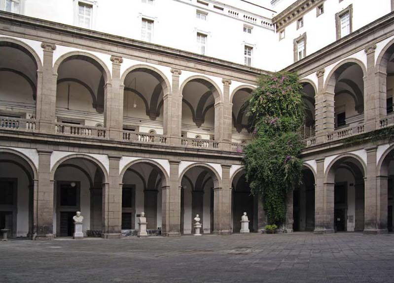 Il "Cortile Monumentale del Salvatore" meglio noto come "Cortile delle Statue" - Napoli